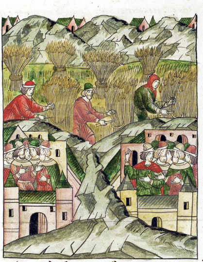 ЛИЦЕВОЙ ЛЕТОПИСНЫЙ СВОД Та зима была очень теплой, и весь снег стаял еще во вторник до последнего воскресения перед Великим Постом, не осталось снега нигде. А осенью много хлеба ушло под снег, и жали люди хлеб в Великий Пост, когда сошел снег, в тех местах, где не побывало литовское войско, а весь снег стаял во вторник на Феодоровой неделе.